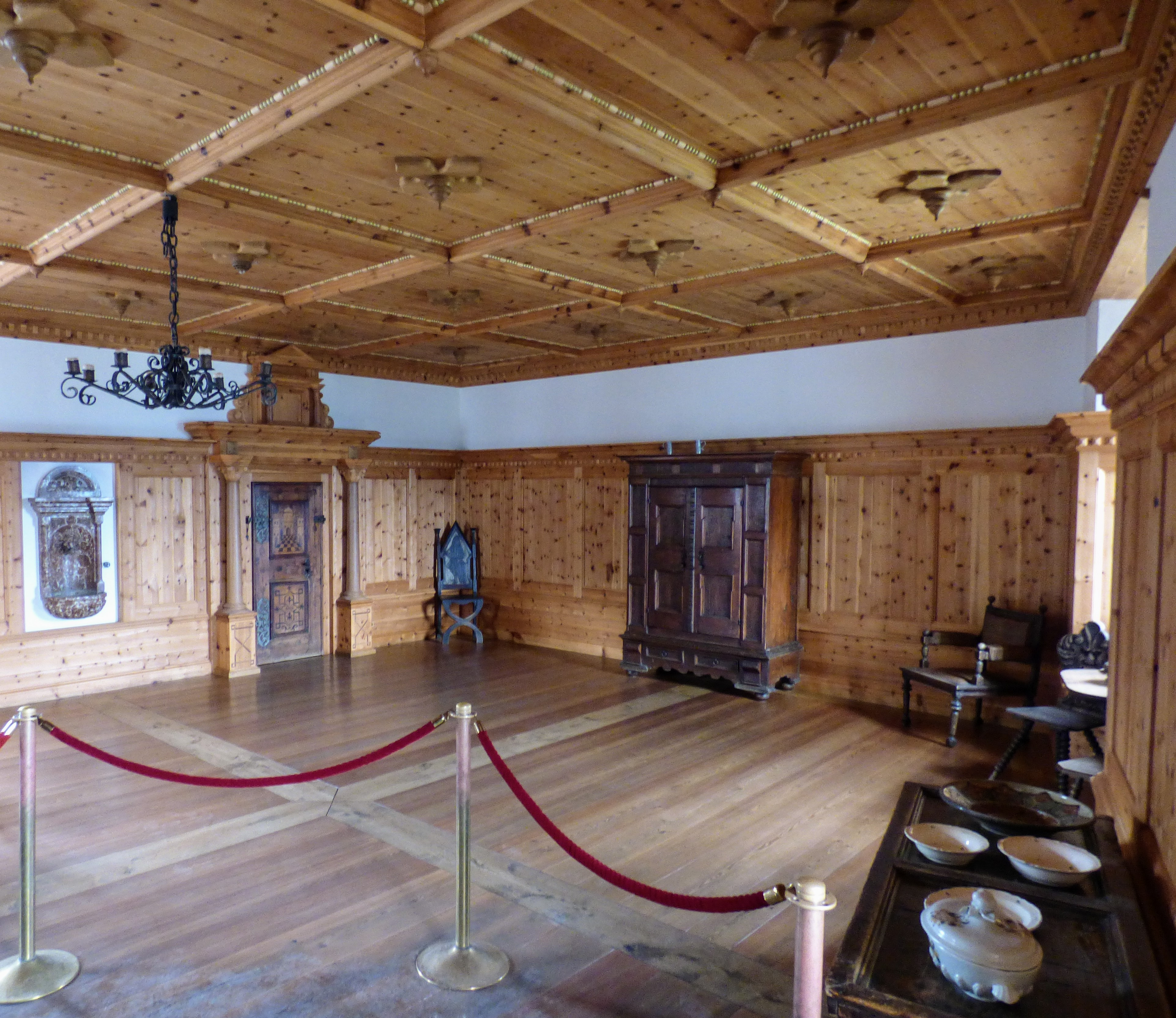 Fürstenzimmer in der Festung Hohenwerfen